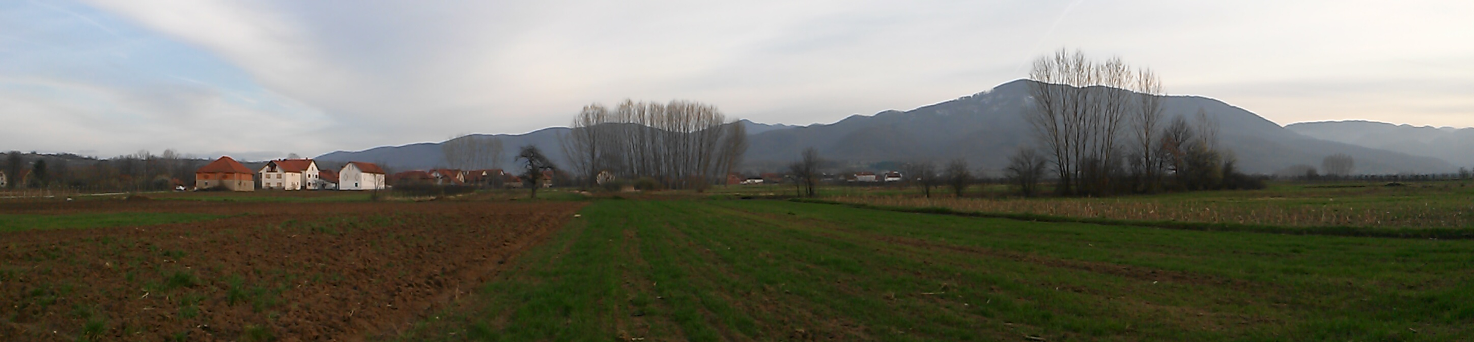 Srpski (latinica): Planina Kukavica